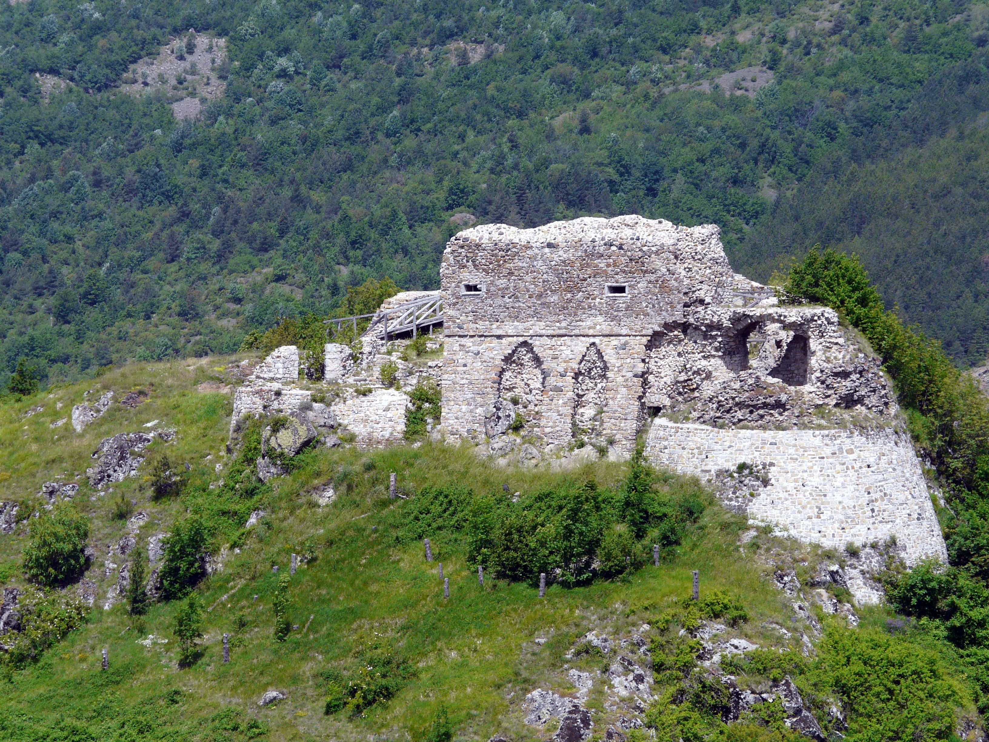 Castello di Cariseto, Cerignale, Emilia-Romagna, Italia